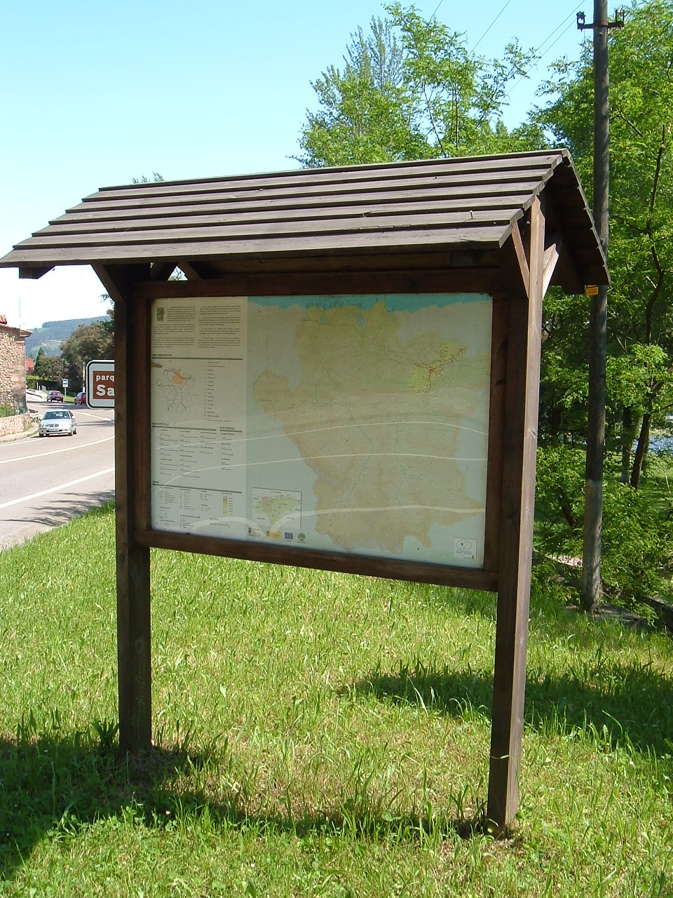 Cartel de la comarca Saja-Nansa a la entrada del municipio de Cabezón de la Sal (Cantabria, España)